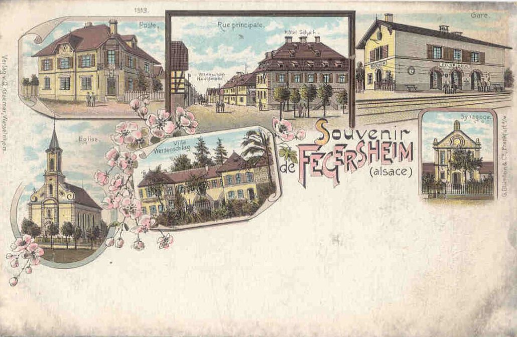 Ansichtskarte von Fegersheim im Elsass